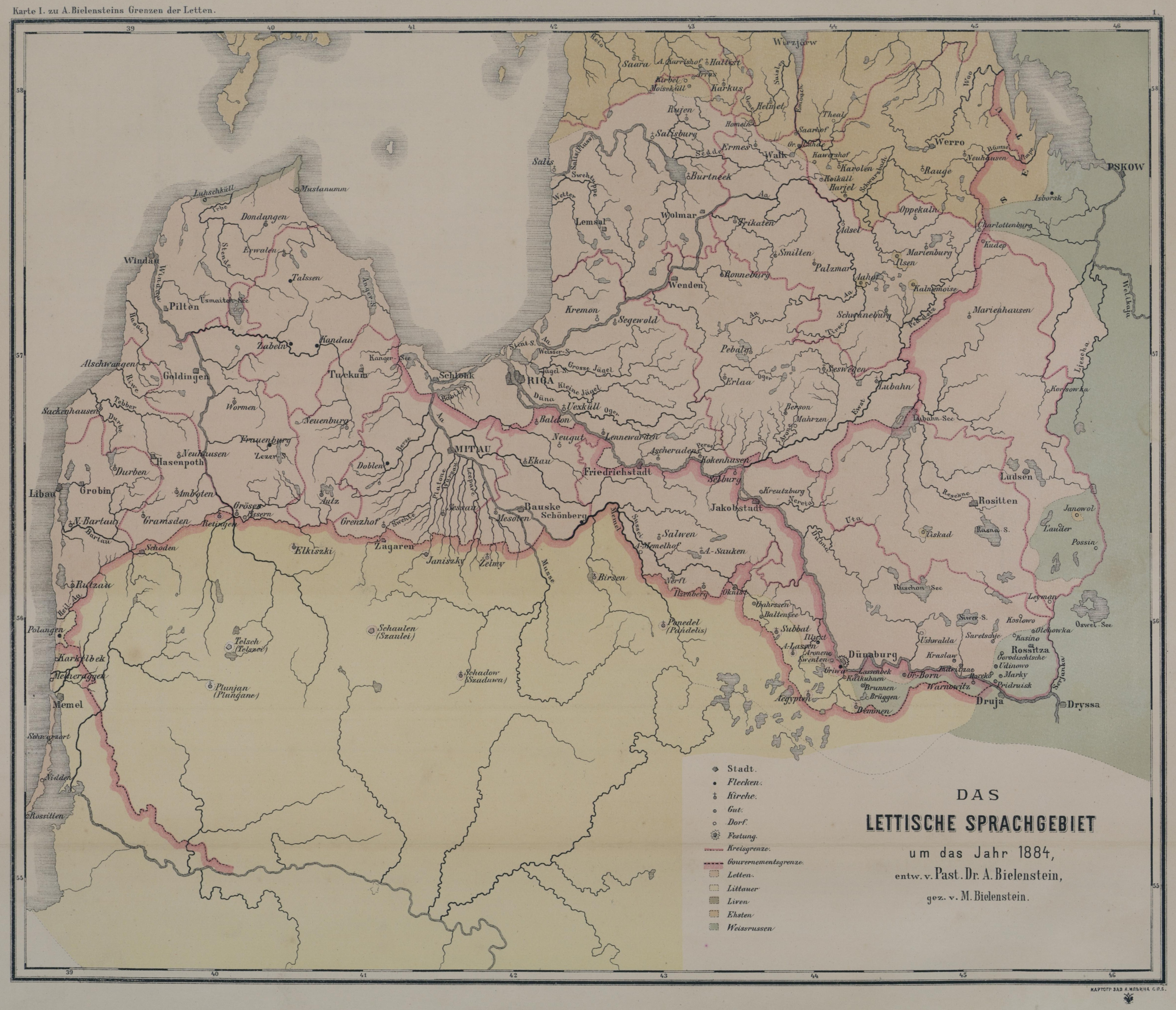 Eine von 12 Dateien, bezeichnet mit "Bielenstein Atlas..." von August Bielenstein. Beschrieben in "Bielenstein Atlas Text 1.jpg" bis "Bielenstein Atlas Text 4.jpg"